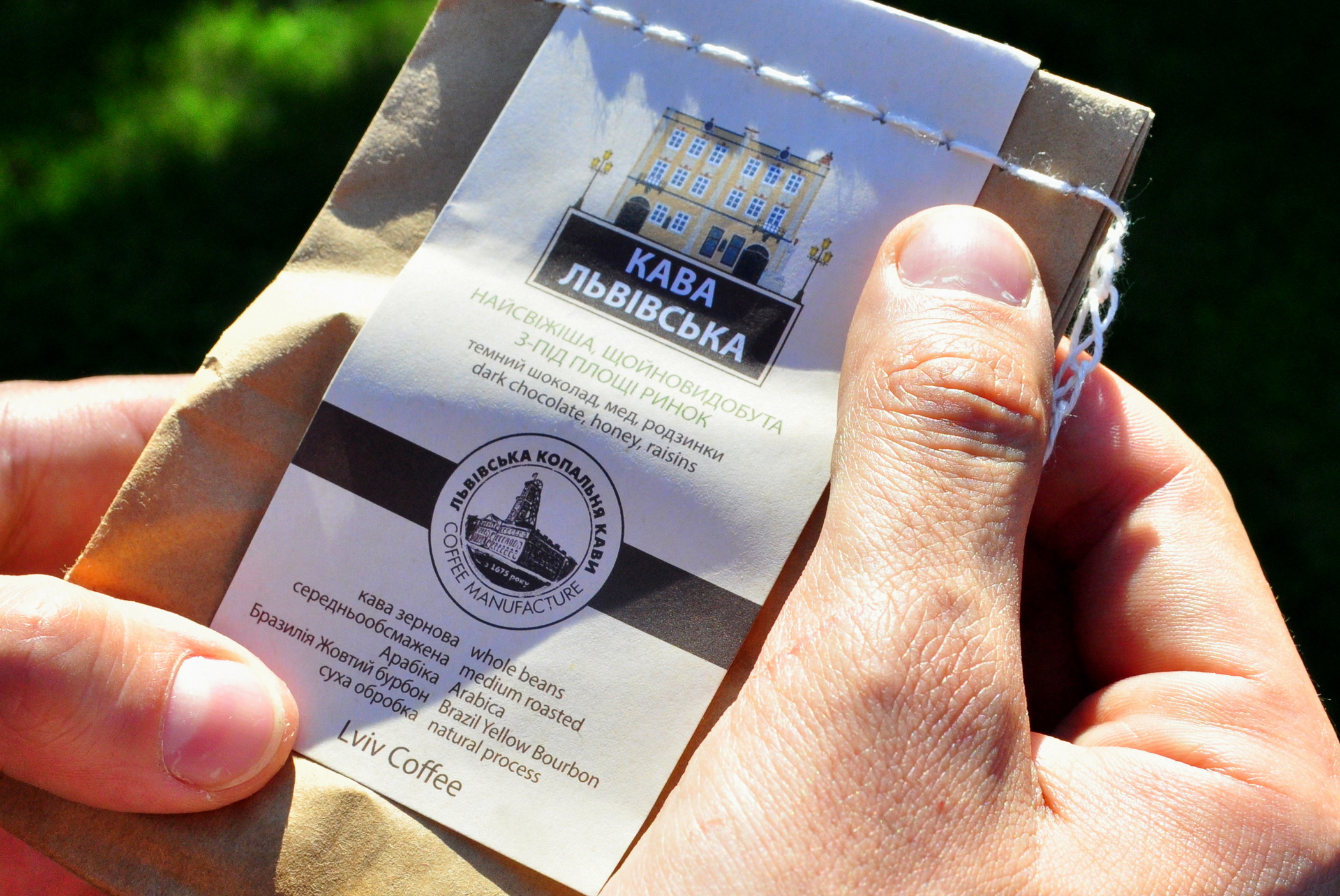 Opakowanie kawy z lwowskiej palarni